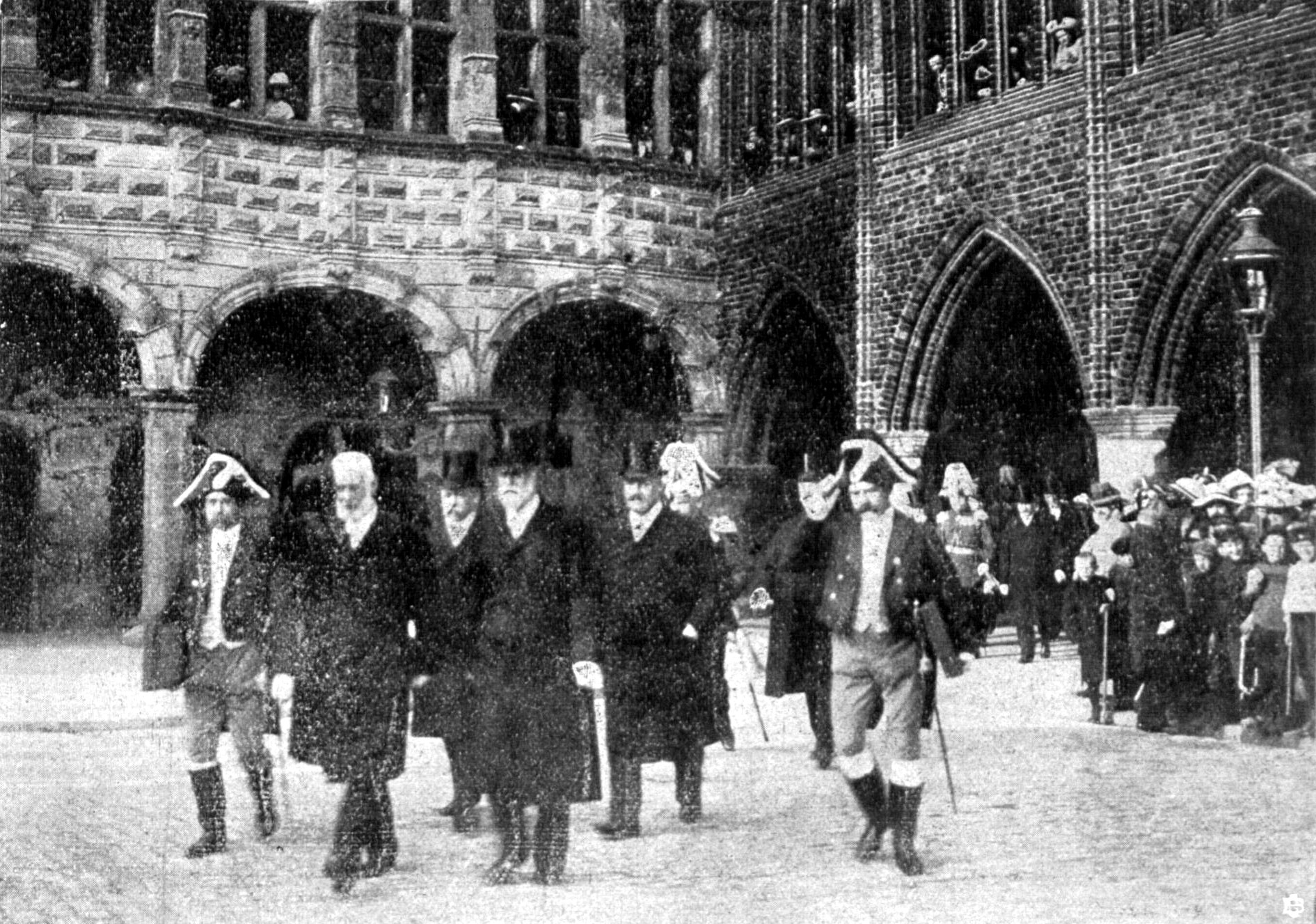 Mitglieder des Senats begeben sich zur Schmückung der Fahnen begeben sich flankiert von Ratsdienern am 17. Mai 1912 auf den dafür vorgesehenen Marktplatz.